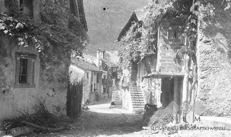 Ulica v Starem selu.